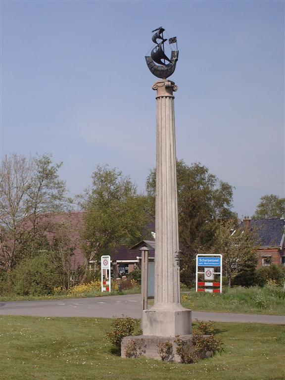 Gedenkzuil Peter Stuyvesant bij Scherpenzeel